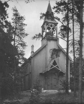 Bygdøy kapell (1876-1958) Arkitekt: Johannes Henrik Nissen